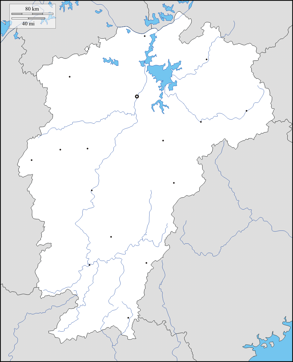 中国安徽省地理位置图。来源：OpenStreetMap